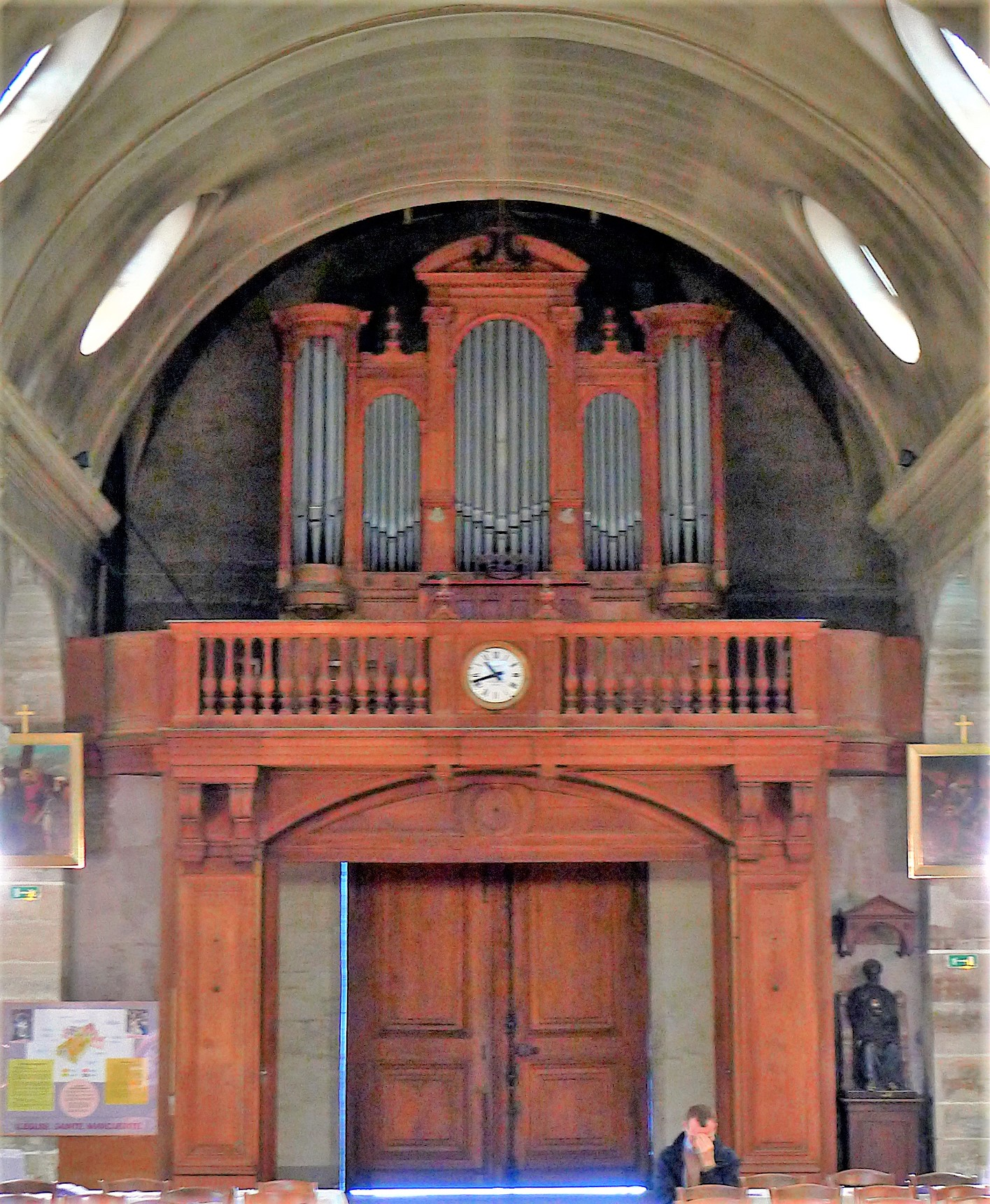 Église Sainte-Marguerite (orgue) - Paris XI